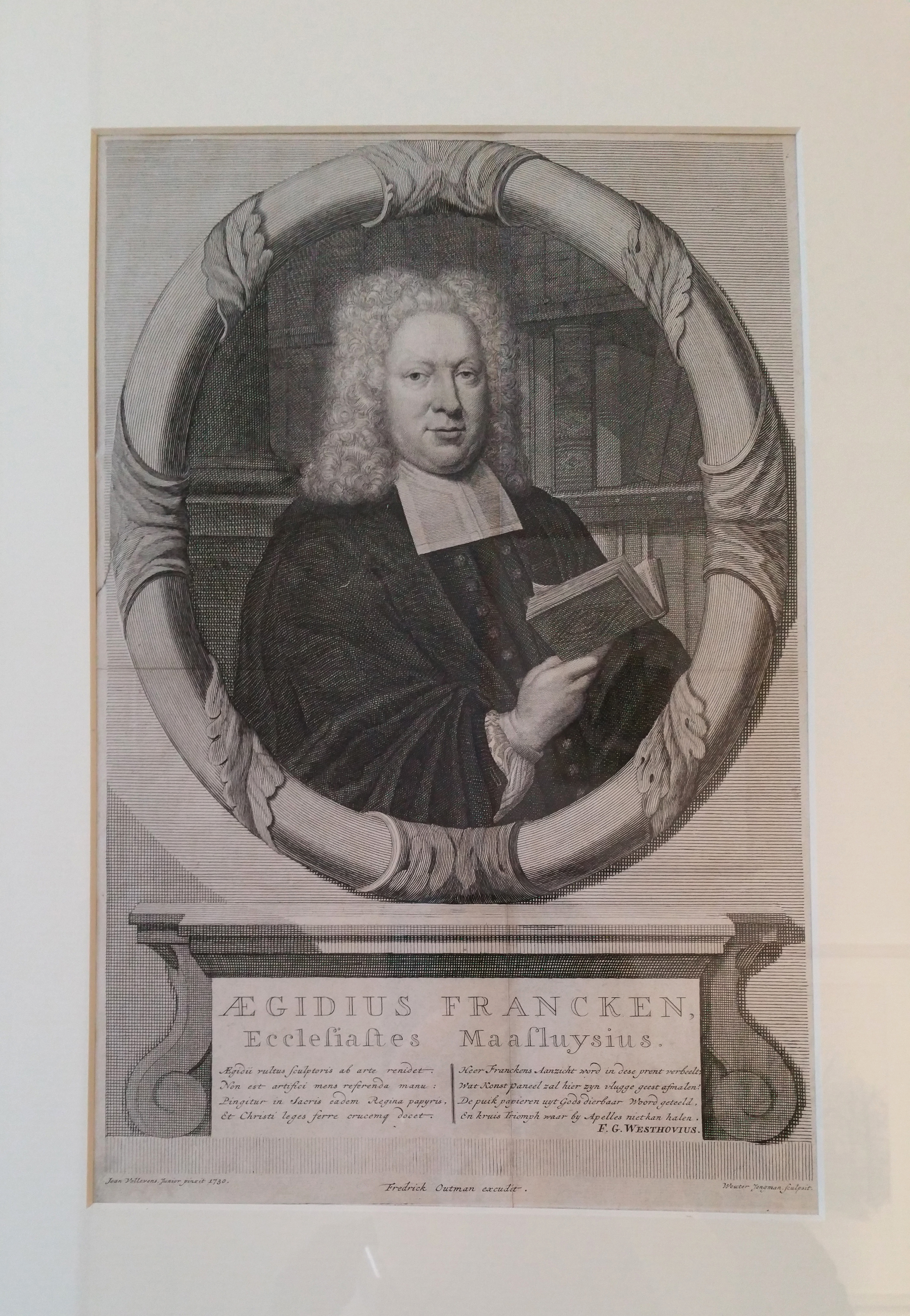 label QS:Lnl,"Aegidius Francken Ecclisastus Maassluysius (1676-1743)"